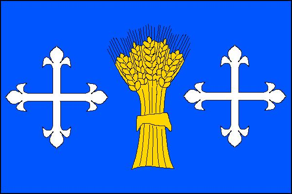 Vlajka obce Drásov